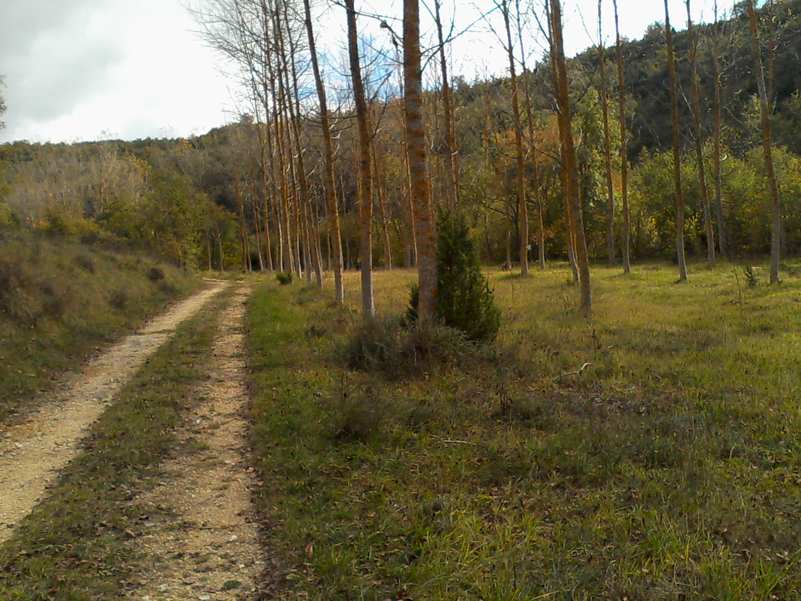 Urartetik Markizerako Erroten bidea